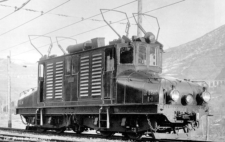 Erste französische E-Lokomotive "LeDrac“ Foto von 1903